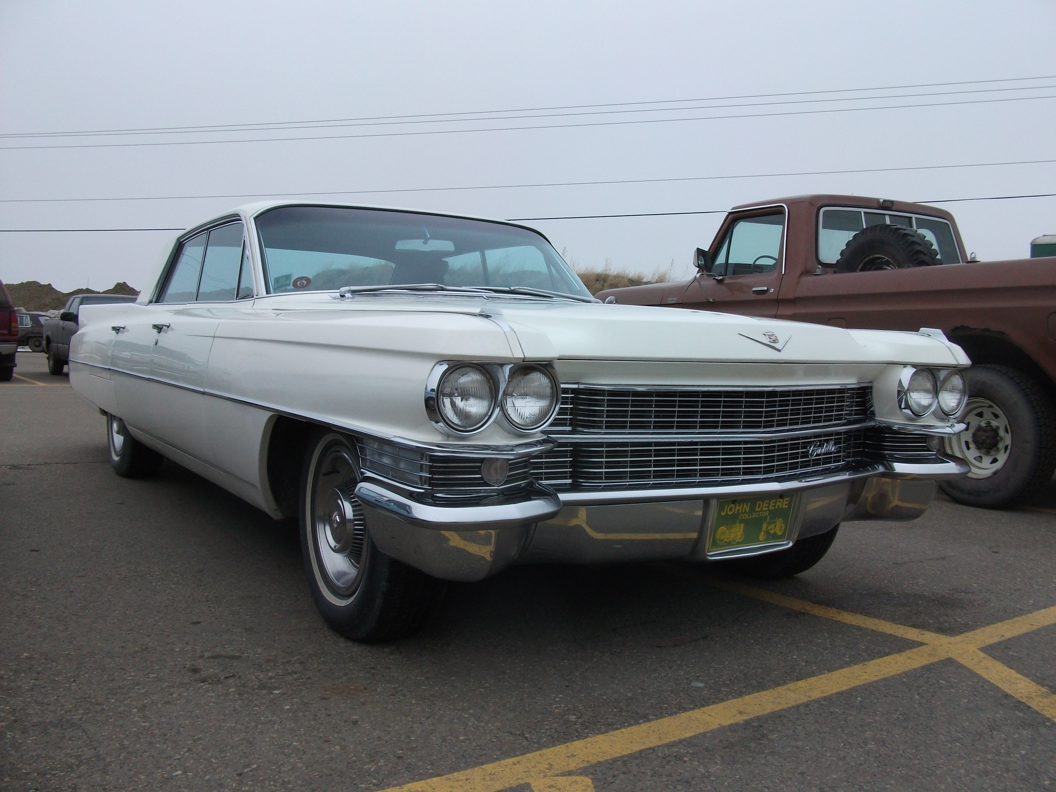 1963 Cadillac Series 62